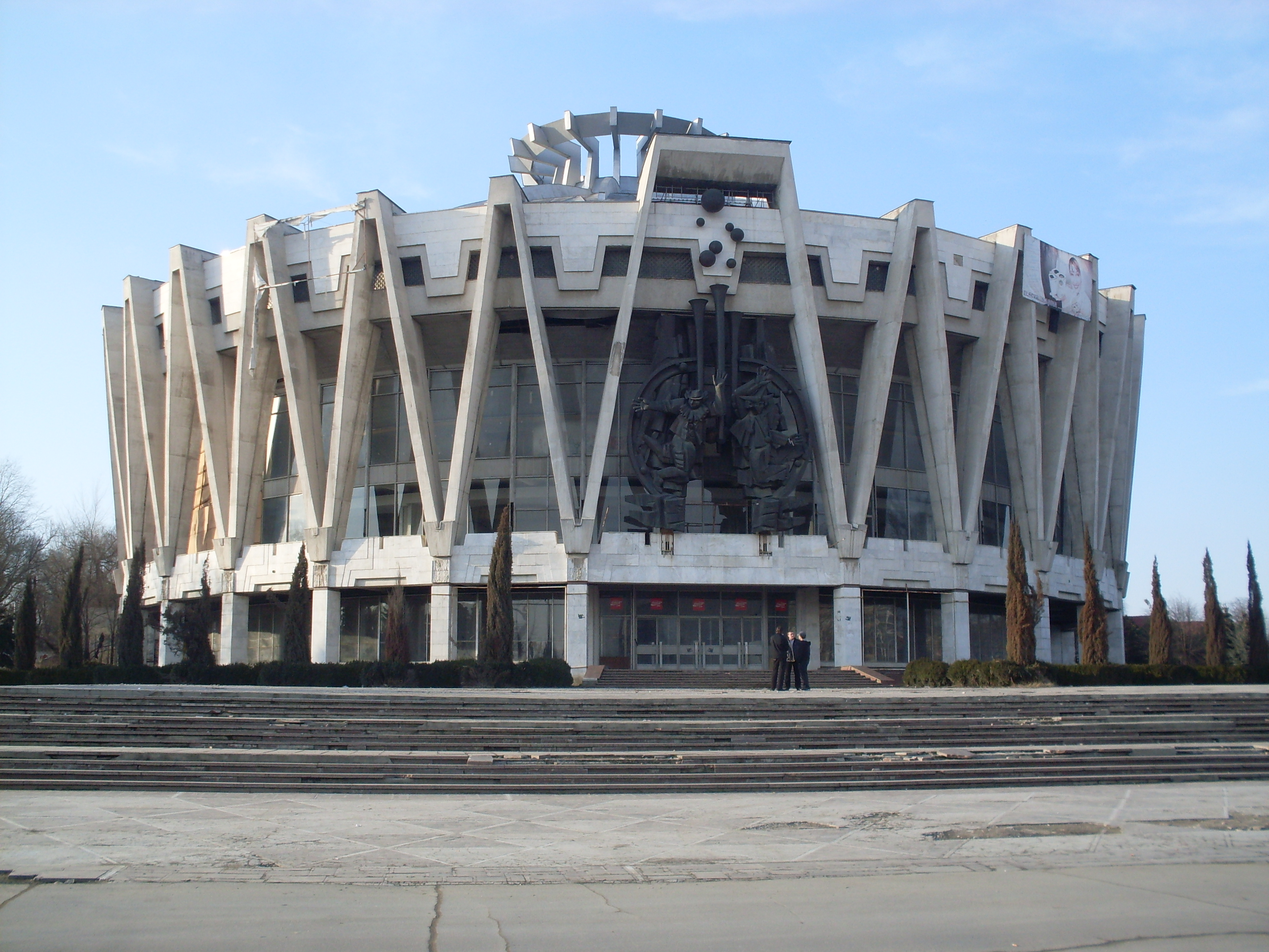 Circul de Stat din Chişinău, vedere frontală